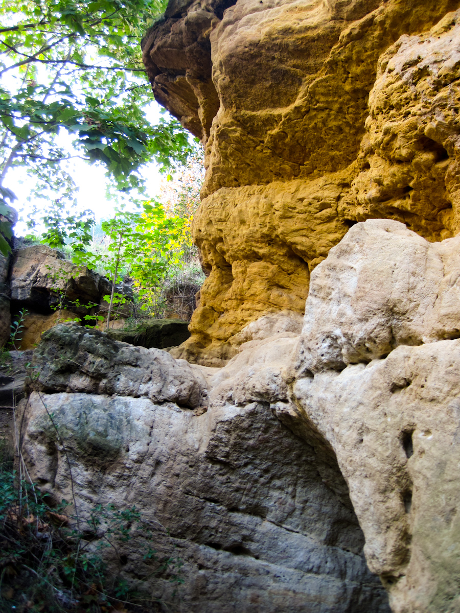 Prochazka v PP Prosecke skaly. Fotografie jsou urceny k ilustraci clanku o teto Prirodni pamatce.